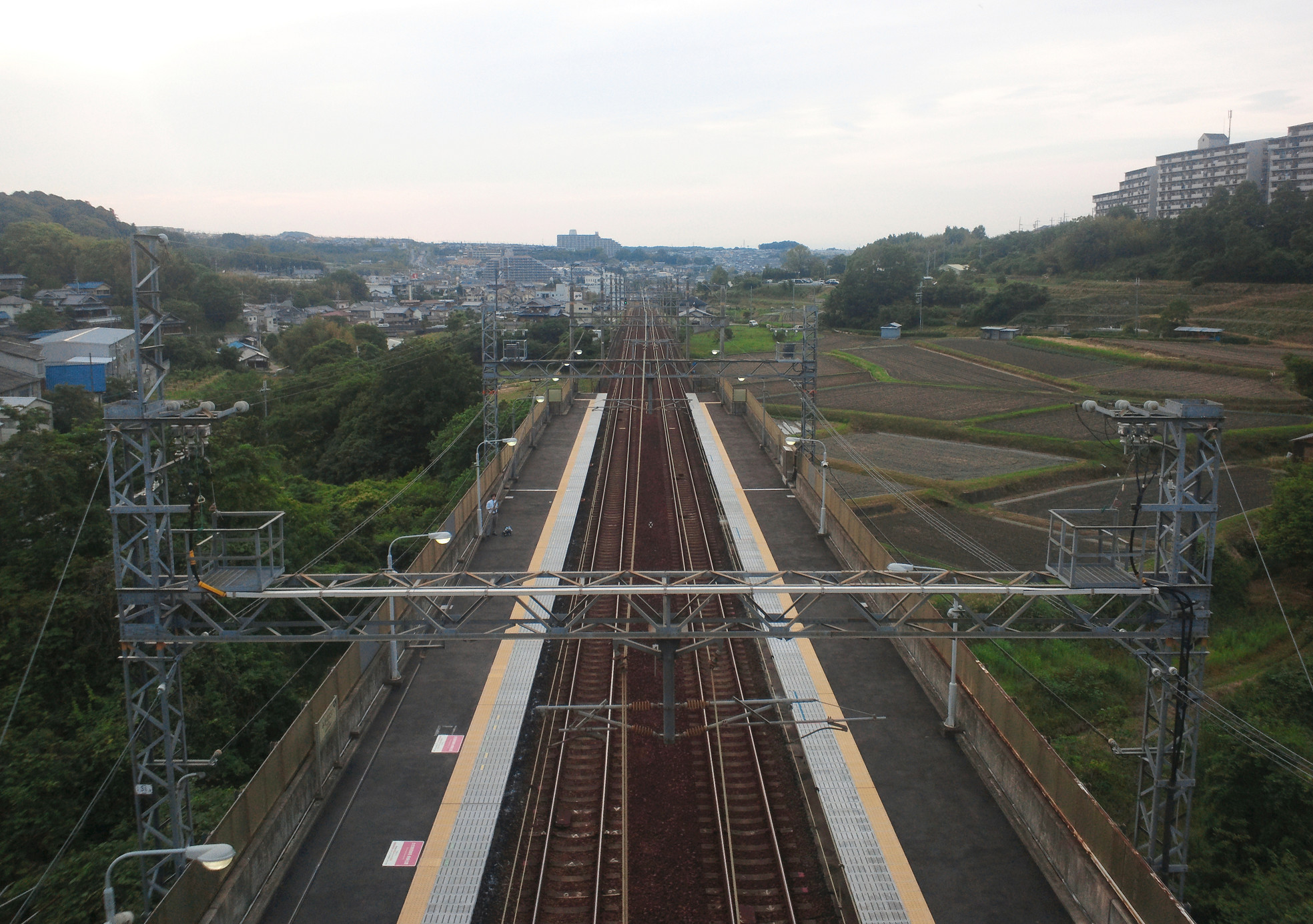 南海美加の台駅より難波方面